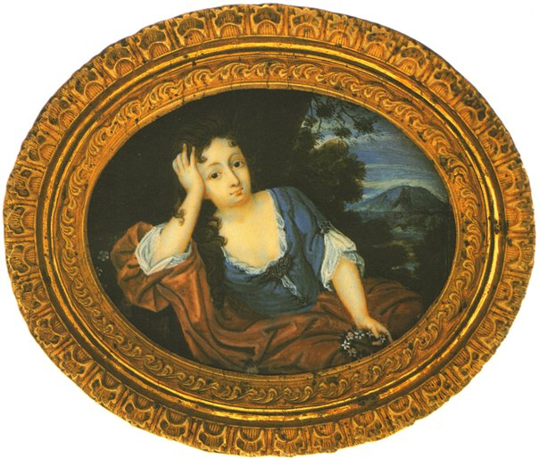 Баронесса Анна Петровна Шафирова, в замужестве княгиня Гагарина